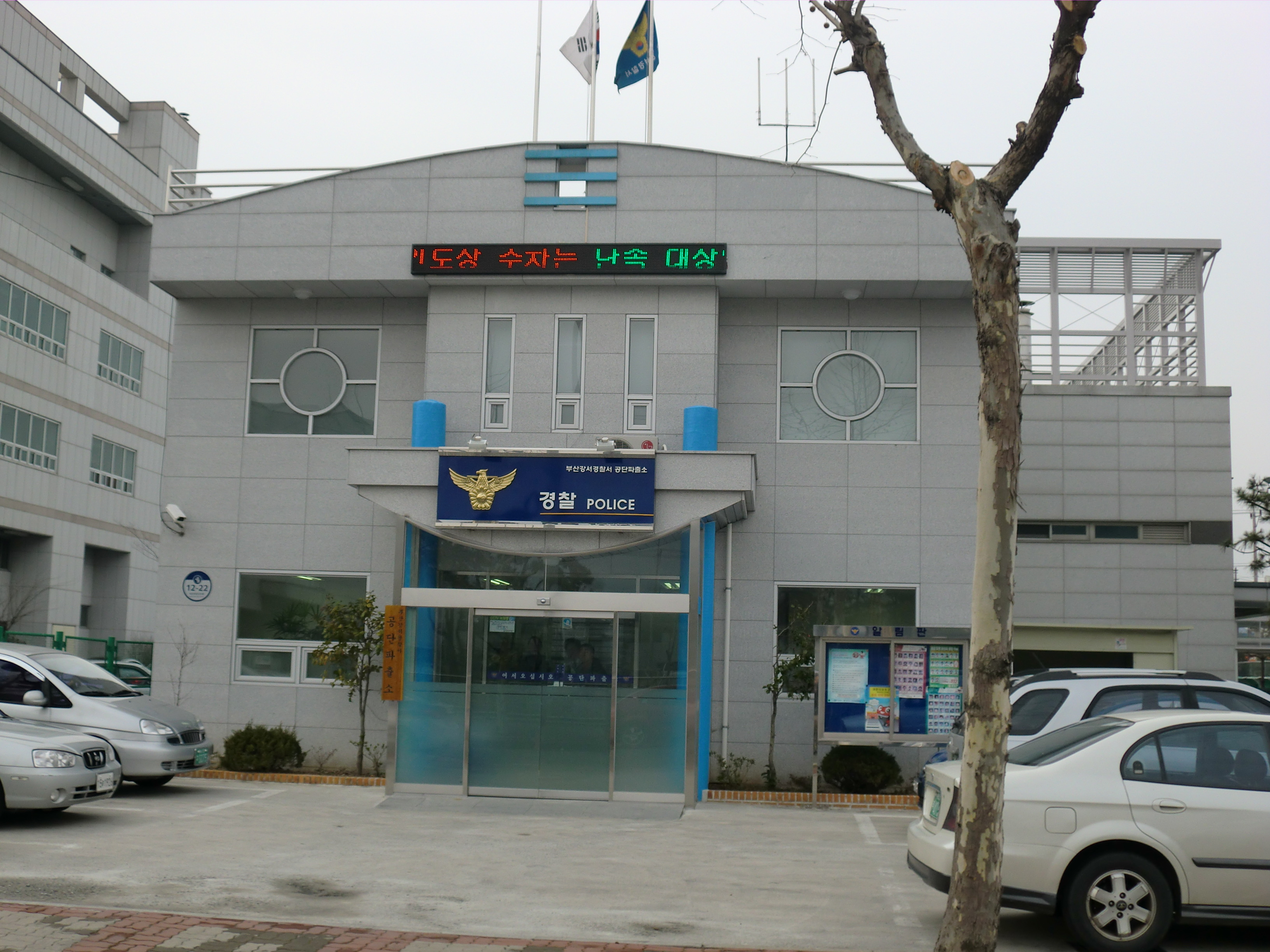 부산광역시 강서구에 있는 부산강서경찰서 공단파출소